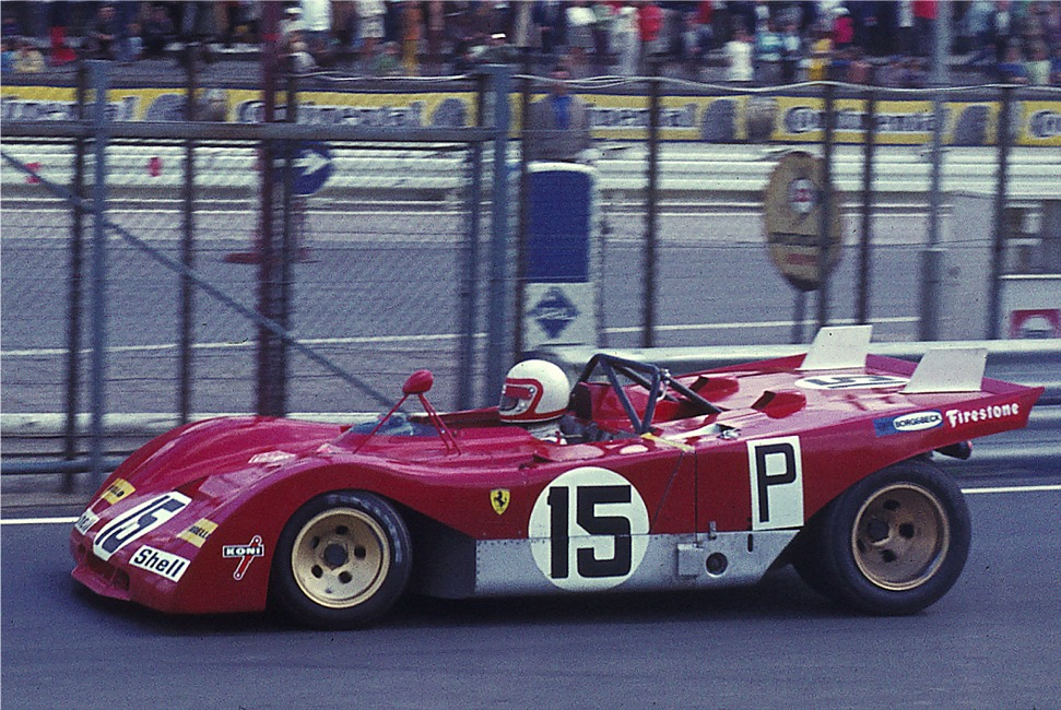 Bildbeschreibung: Clay Regazzoni im Ferrari 312 P beim Training zum 1000-km-Rennen des ADAC auf den Nürburgring (Boxeneinfahrt von der Gegengeraden aus) Fotograf: Lothar Spurzem Datum: 1971-05-29 Die genannte Gegengerade des Nürburgrings gibt es nicht mehr. Eine kleine Abweichung ist möglich.